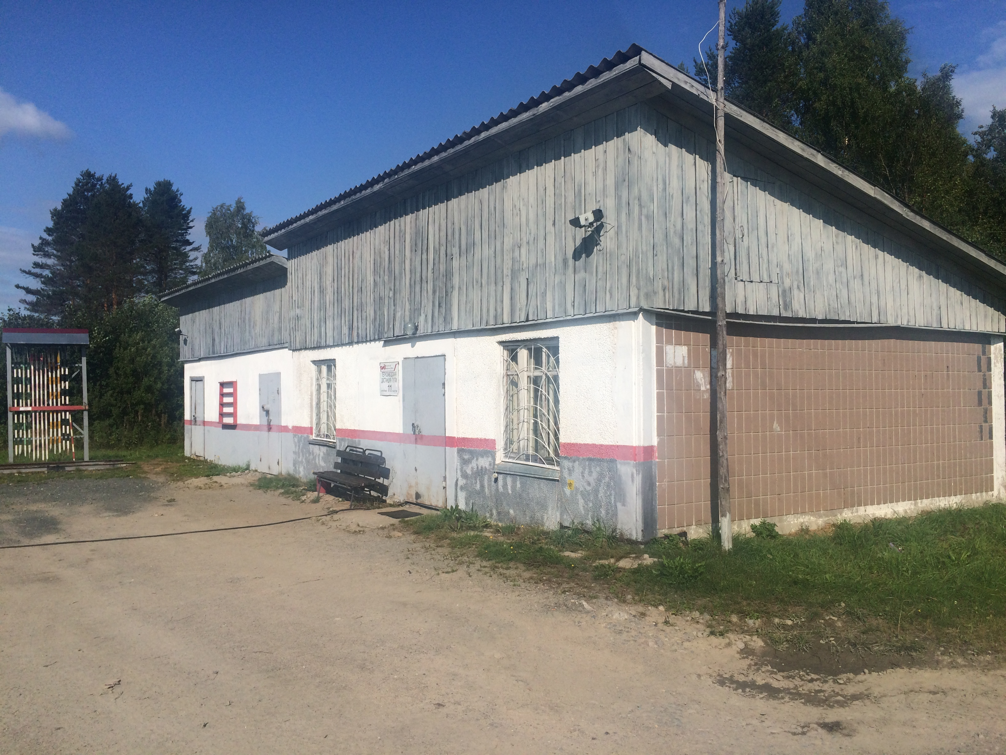 ст. Виллагора